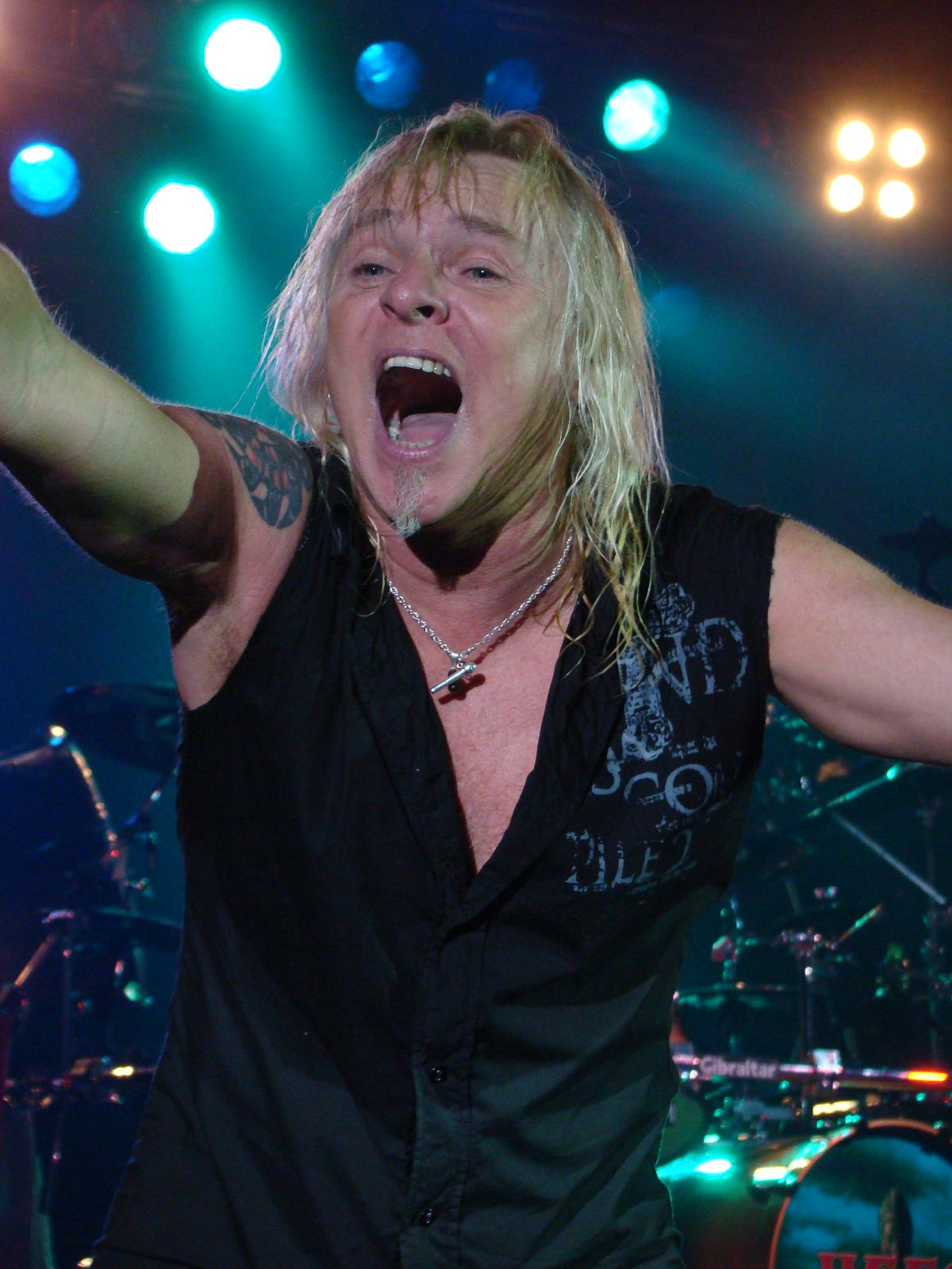 Uriah Heep, Bernie Shaw